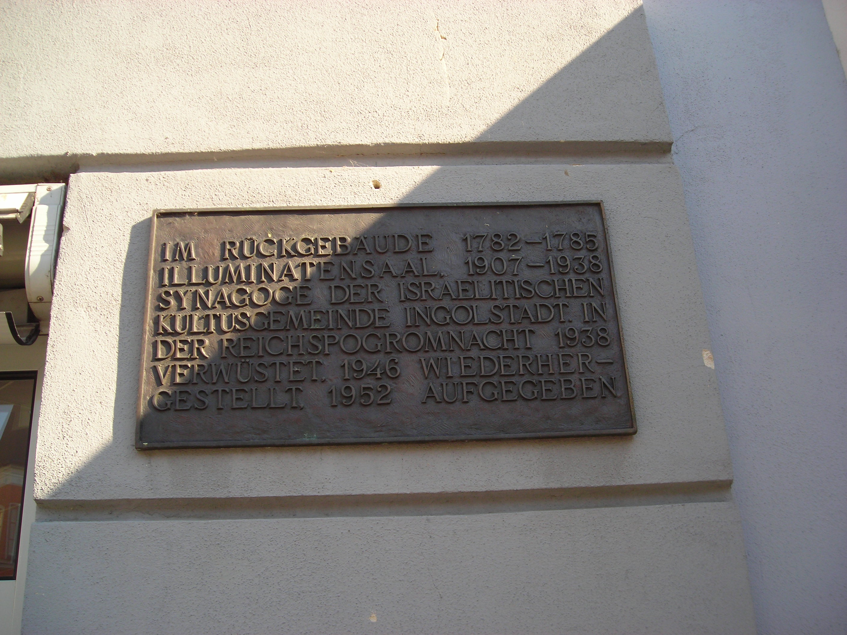 Hinweistafel am Anwesen Theresienstr. 23 in Ingolstadt